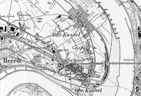 Stadtplan Düsseldorf